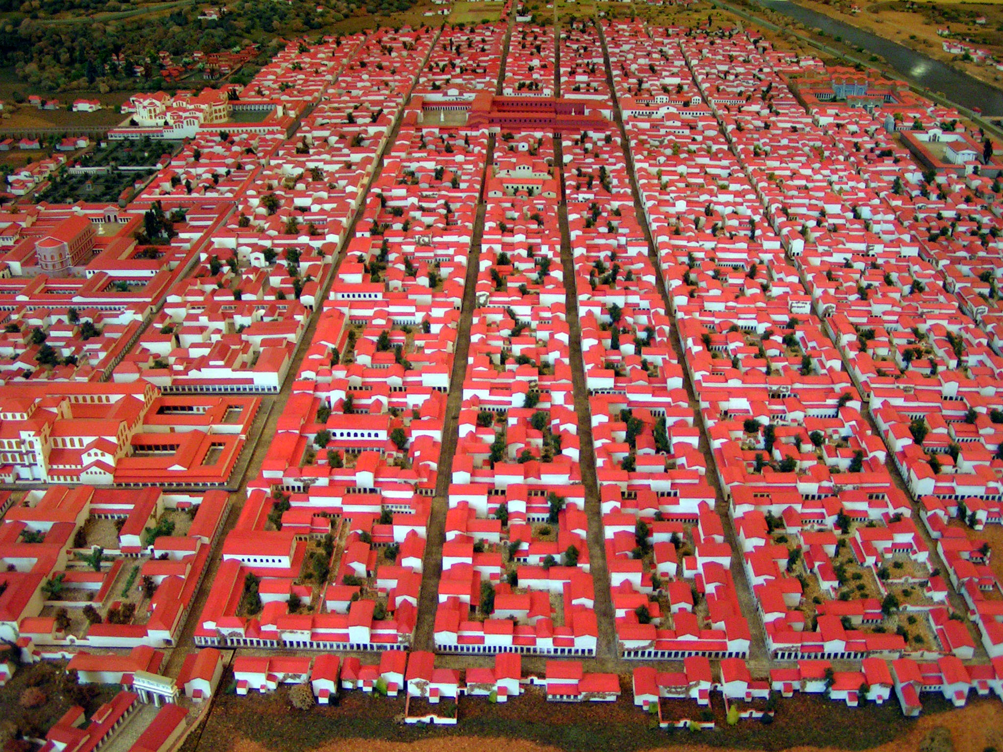 Augusta Treverorum. Modell des Römischen Trier ca. 360/370 n. Chr. im Rheinischen Landesmuseum Trier gebaut von Joachim Woditsch, Trier